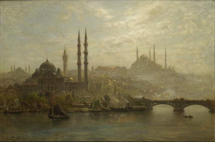 Ernst Koerner: "Stambul am Goldenen Horn" - Ansicht von Istanbul am Goldenen Horn mit Blick auf die Yeni Moschee, den Beyazitturm, sowie die Süleymaniye-Moschee und die Galata Brücke. Öl auf Leinwand. 83,5 x 125,5 cm. Links unten signiert und datiert "Ernst Koerner 1910". Kat. Große Berliner Kunstausstellung 1910, Nr. 1471